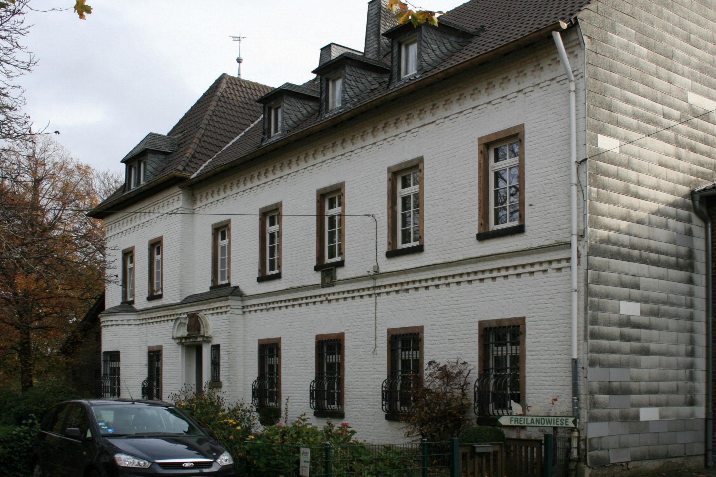 Das Wohnhaus des Hermannshofes in Nörvenich-Eschweiler ü.F.